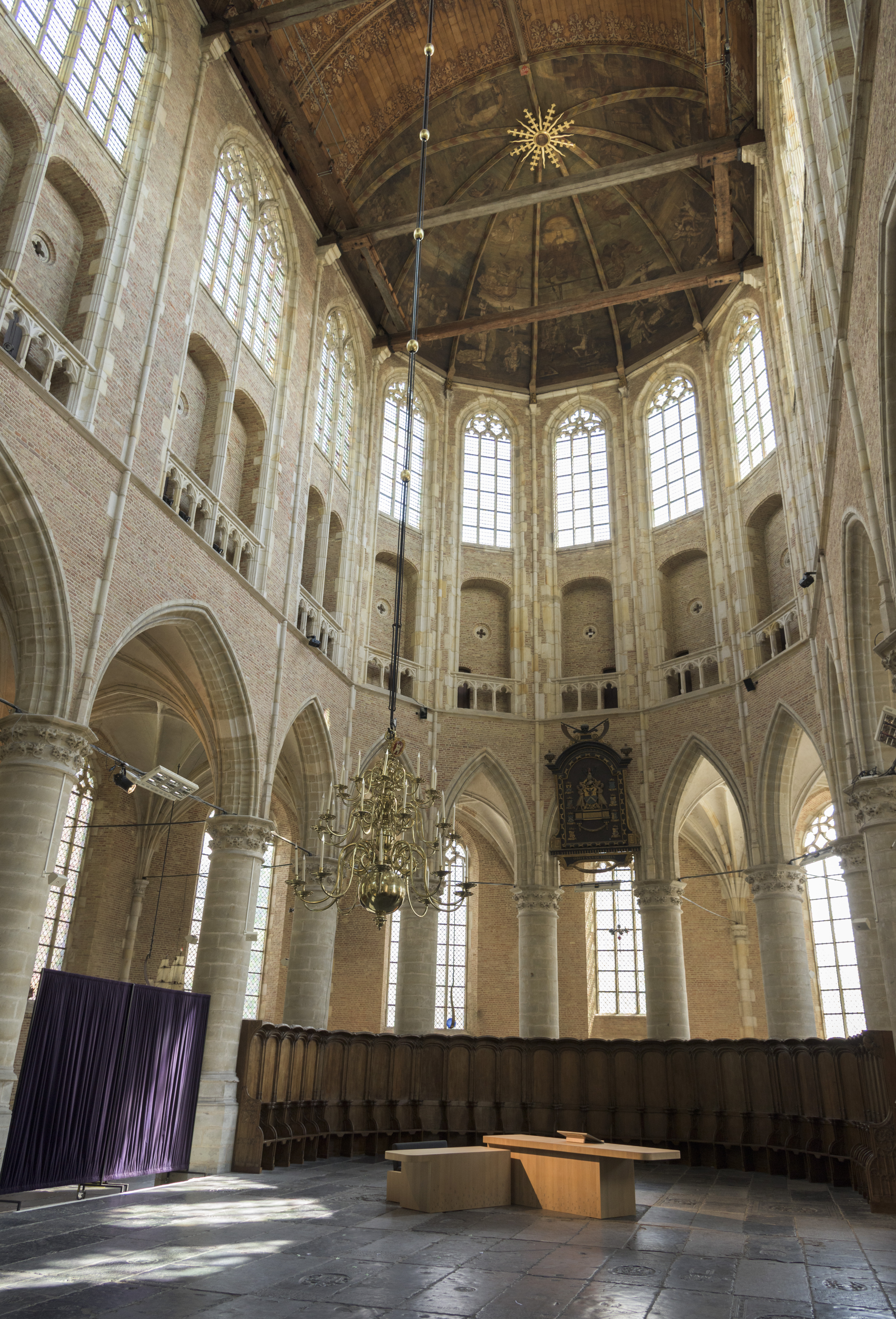 Interieur van de Grote Kerk te Alkmaar.